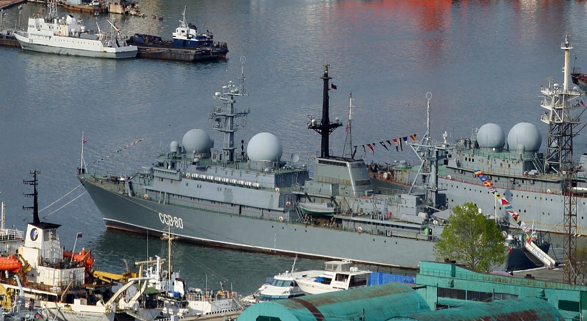 ССВ-80 Прибалтика 2015.05.09